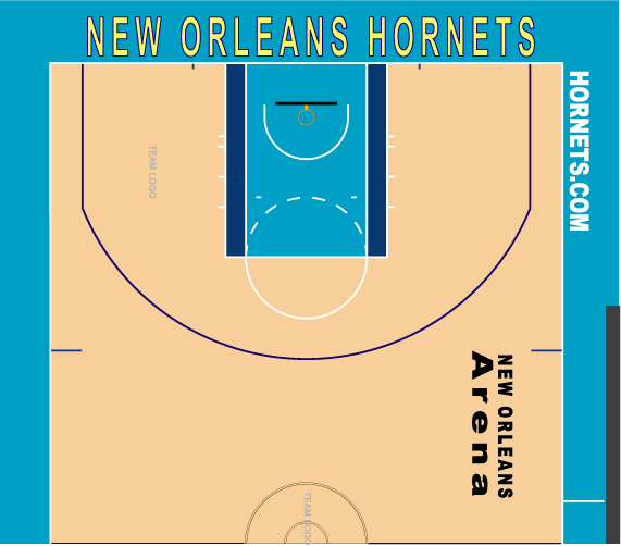 ホーネッツホームコート配色